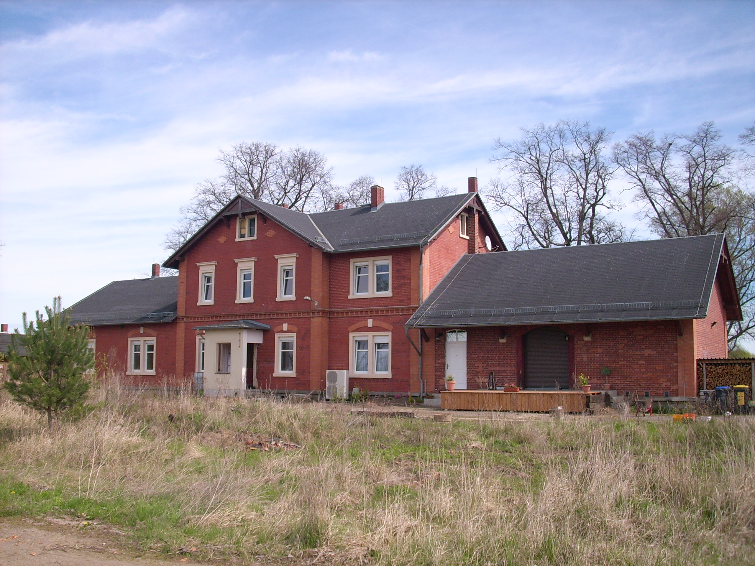 stillgelegter Bahnhof in Königswartha Hornjoserbsce: Zawrjene Rakečanske dwórnišćo při něhdyšej čarje Budyšin–Wojerecy